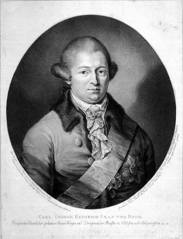 Der preussische Minister Karl Georg von Hoym (1739-1807). "Carl George Heinrich Graf von Hoym, Preussischer Wurklicher geheimer Staats Krieges und Dirigirender Minister in Schlesien und Südpreussen &. &. 1794 Gemahlt von C. D. F. Bach Director der Königlichen Kunst Akademie zu Breslau Profesor der Churfürstlich. Mahler. Akademie zu Düsseldorff Ordentliches Mitgliede der Königlich. Kunstakademie zu Berlin &c. Von Sintzenich gestochen. Churfürstl. Pfalz Bayrischer Hof Kupferstecher. Ordentliches Mitgliede der Königlichen Akademie der Schönen Künsten zu Berlin und zu Mannheim &c."